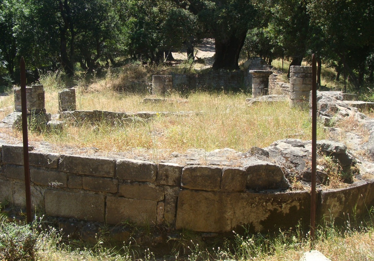 Vue des ruines de la Cursa, sur le flanc de la colline de Prunelli-di-Fiumorbo